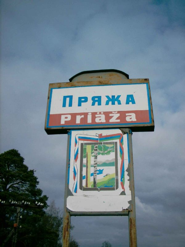 Указатель с гербом Пряжинского района